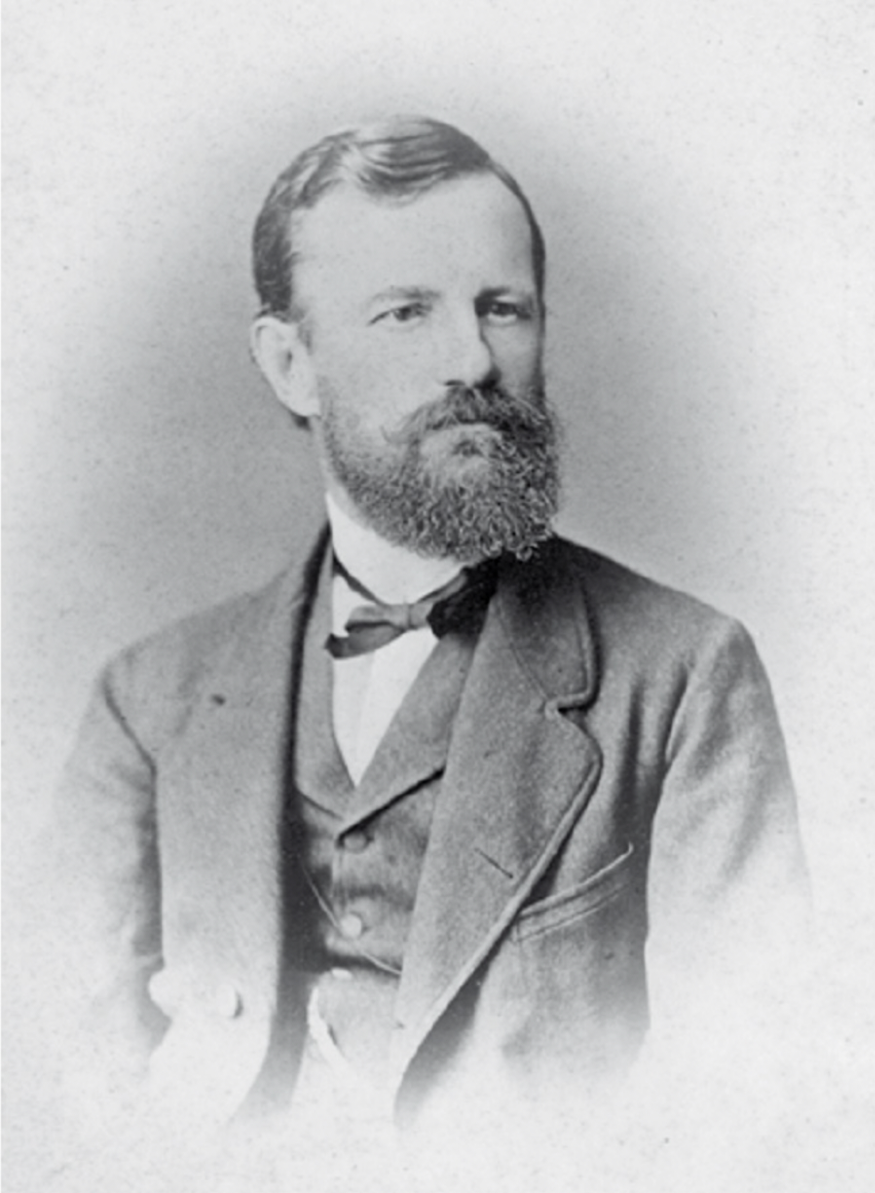 Carl Wilhelm Merck (* 6. Dezember 1823 in Darmstadt; † 1. März 1885 ebd.), Fabrikant